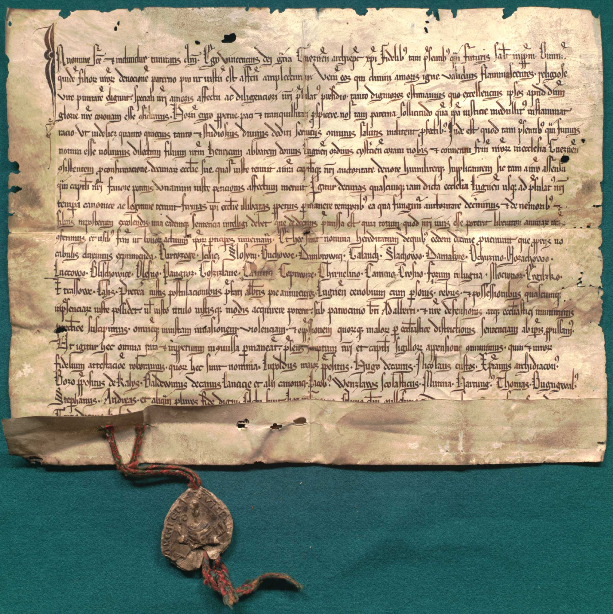 Wincenty, abp gnieźnieński, nadaje opactwu cystersów w Łeknie dziesięciny z wiosek: Bartodzieje, Słosin, Bukowiec, Łukowo, Panigródz, Oleszno i innych. Język: łac. Opis zewnętrzny: oryg., 1 k. pergaminowa, 36 x 32 cm; fragment pieczęci na sznurze, sznur po pieczęci Decyzja z 1222 roku